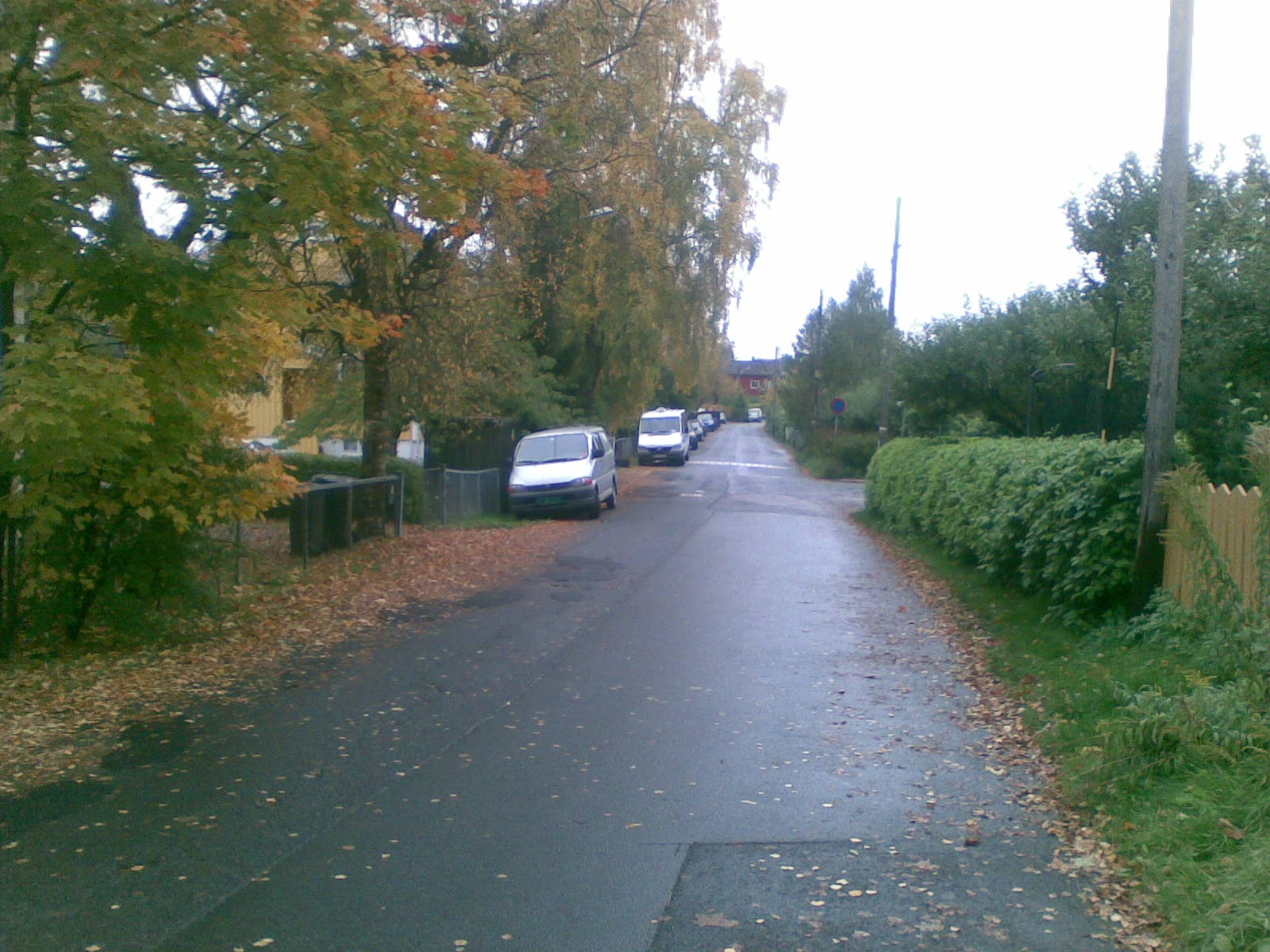 Konvallveien i Oslo fra nr 9 mot vest.